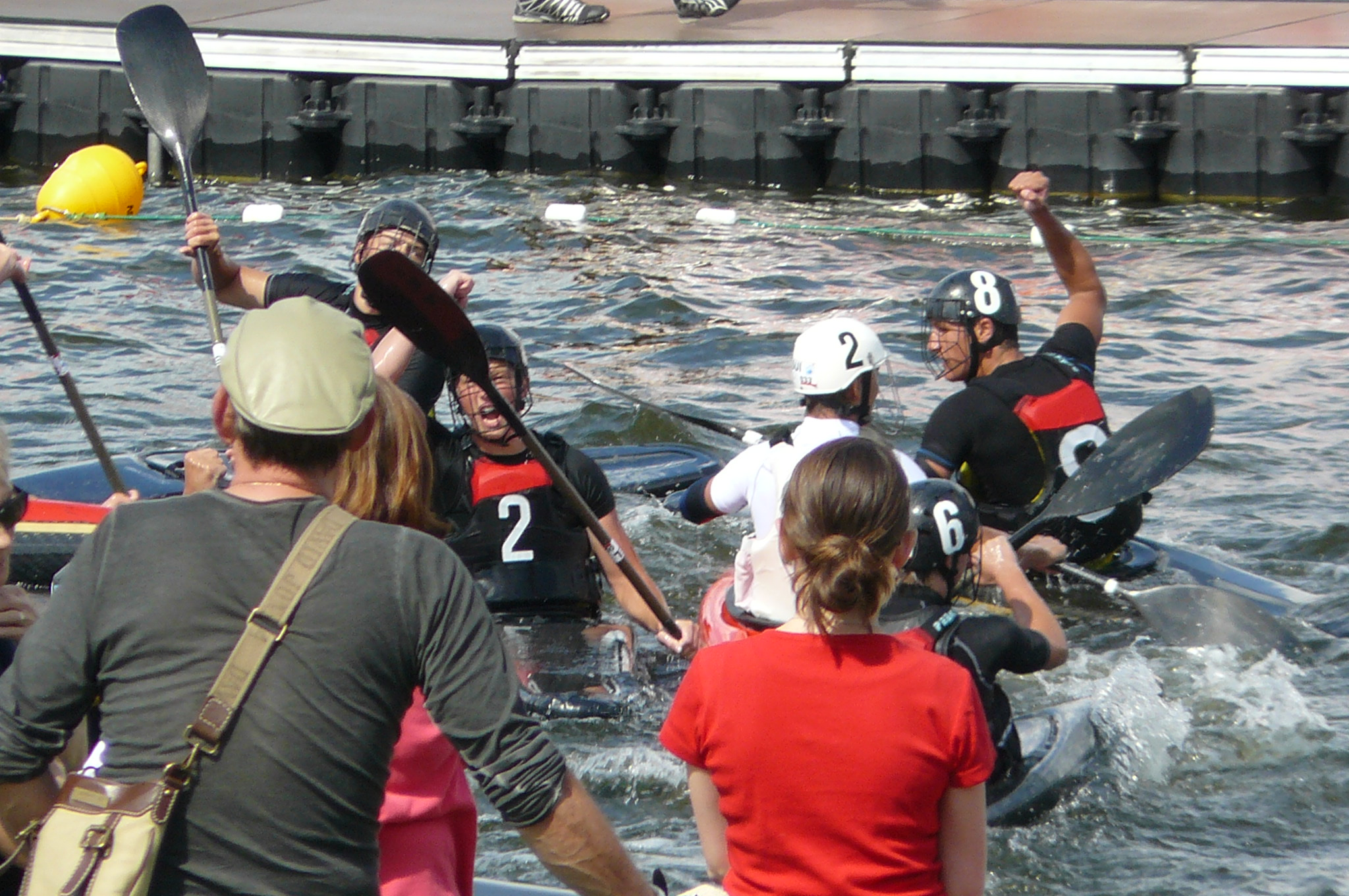 Mistrzostwa Europy w Kajak-polo, Poznań, sierpień 2013r. Jez. Maltańskie.